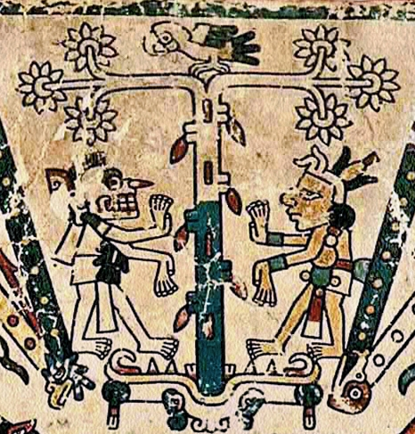 Page 1 du Codex Fejéváry-Mayer. Les 4 points cardinaux aztèques et les 4 signes "porteurs d’années". Au sud, le cacaotier. Foundation for the Advancement of Mesoamercan Studies, Inc. (FAMSI).